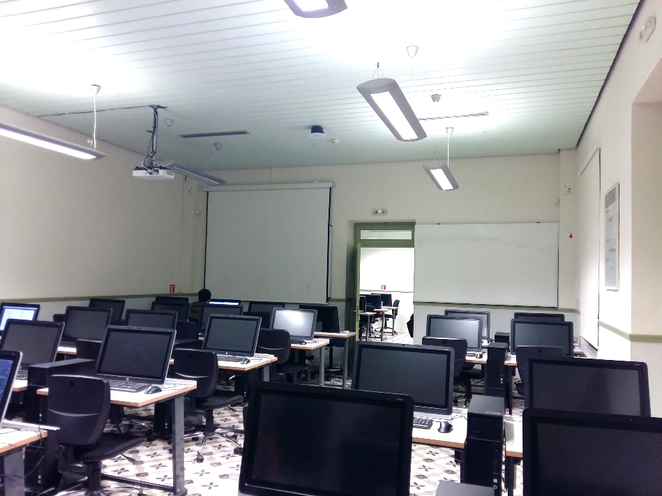 Τα εργαστήρια των Η/Υ διατίθεντε για διεξαγωγή εργαστηριακών μαθημάτων (CAD/CAM, animation, game design, programming, web/app design etc).